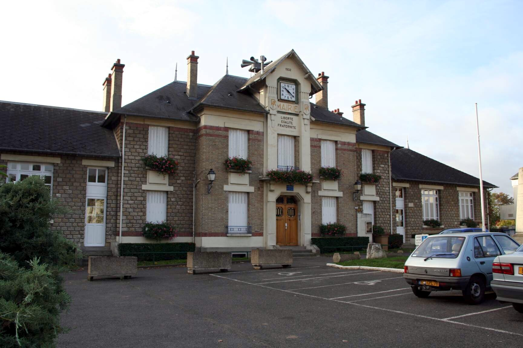 Mairie d'Issou - Yvelines (France)